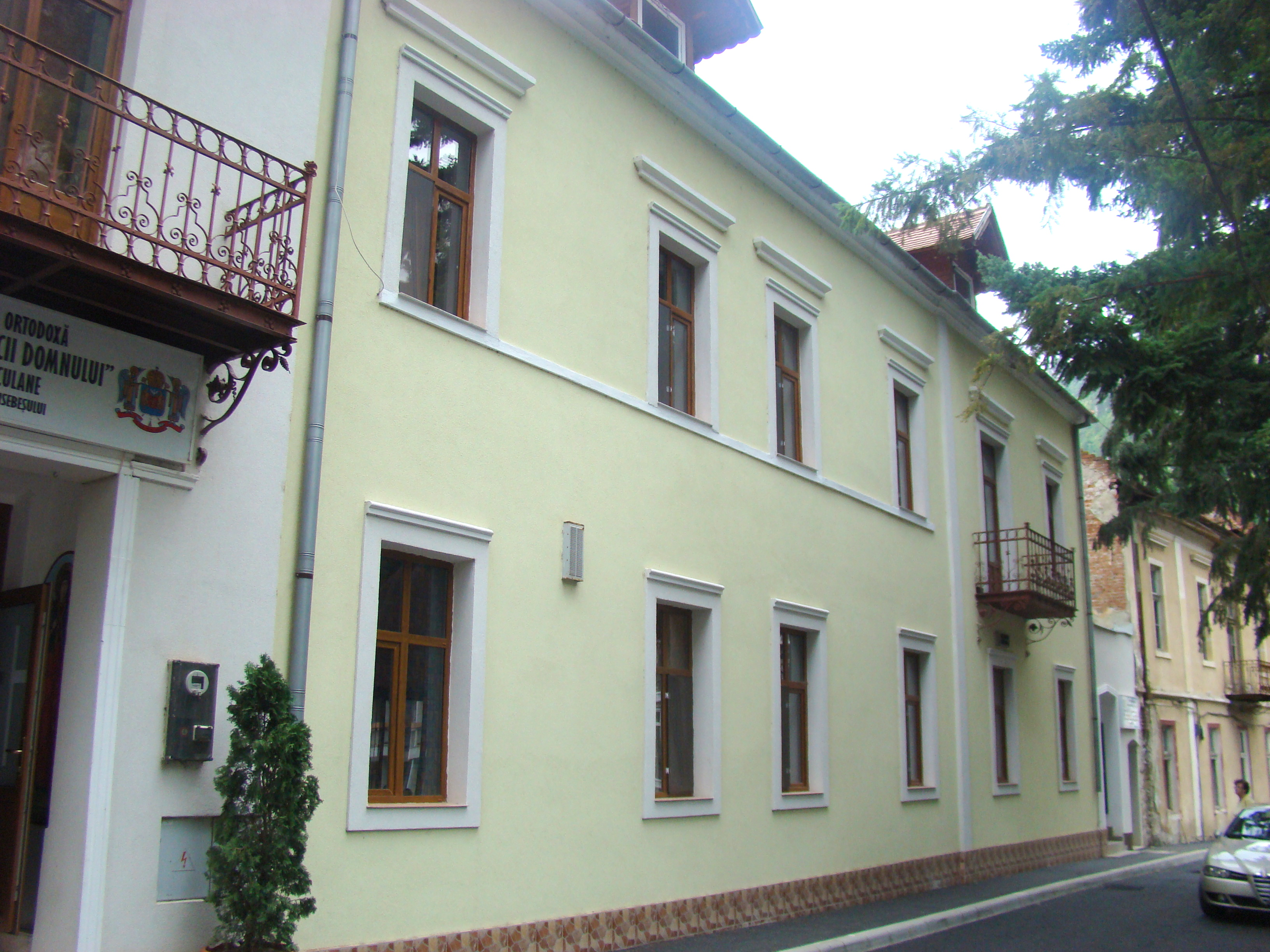 Vila „Doboșan”, azi Așezământul social "Nașterea Maicii Domnului", oraș Băile Herculane, Str. Stoica de Hațeg Nicolae 5